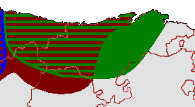 Límites de las características fonéticas del montañés